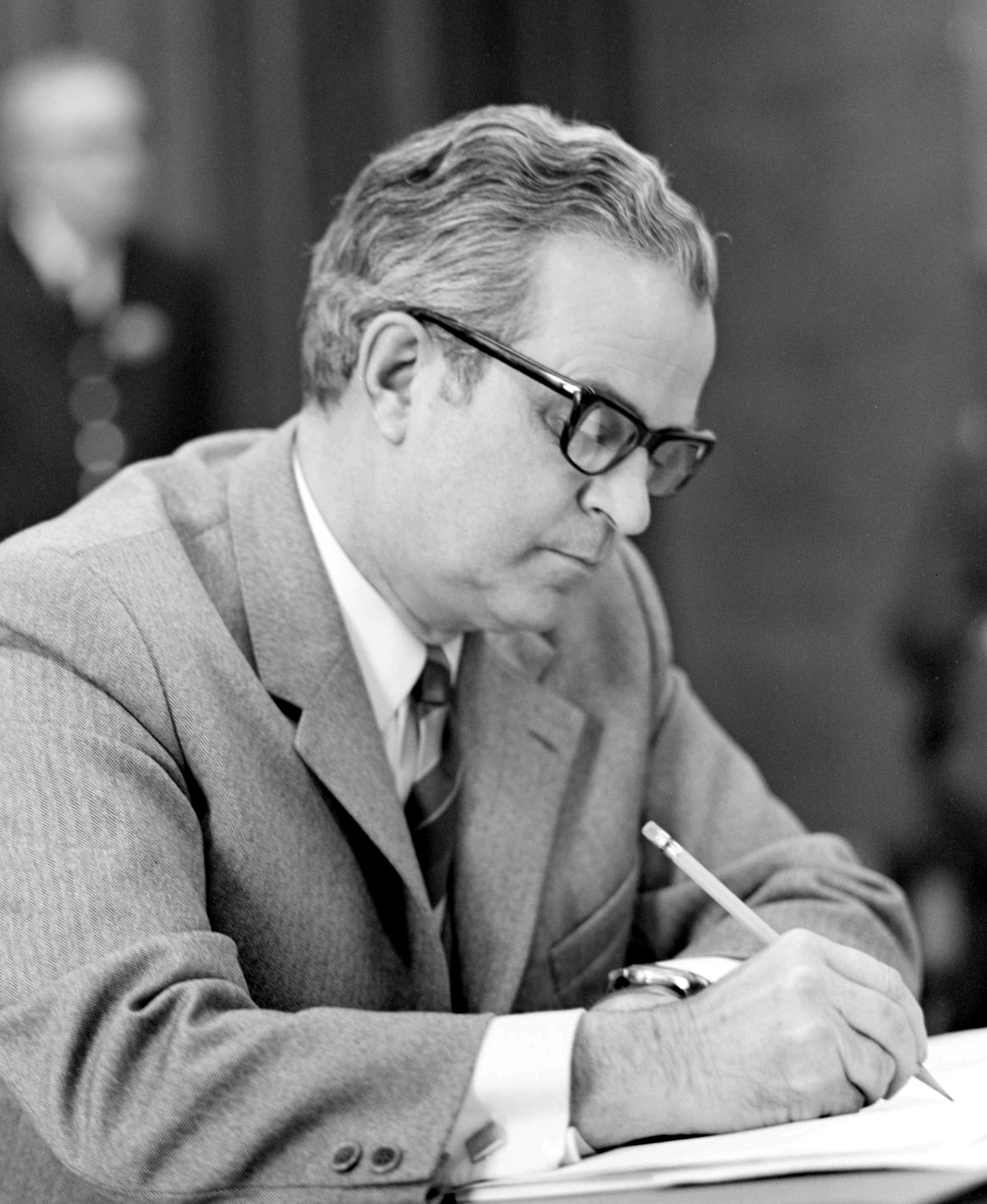 Premier ministre du Québec du 2 octobre 1968 au 12 mai 1970